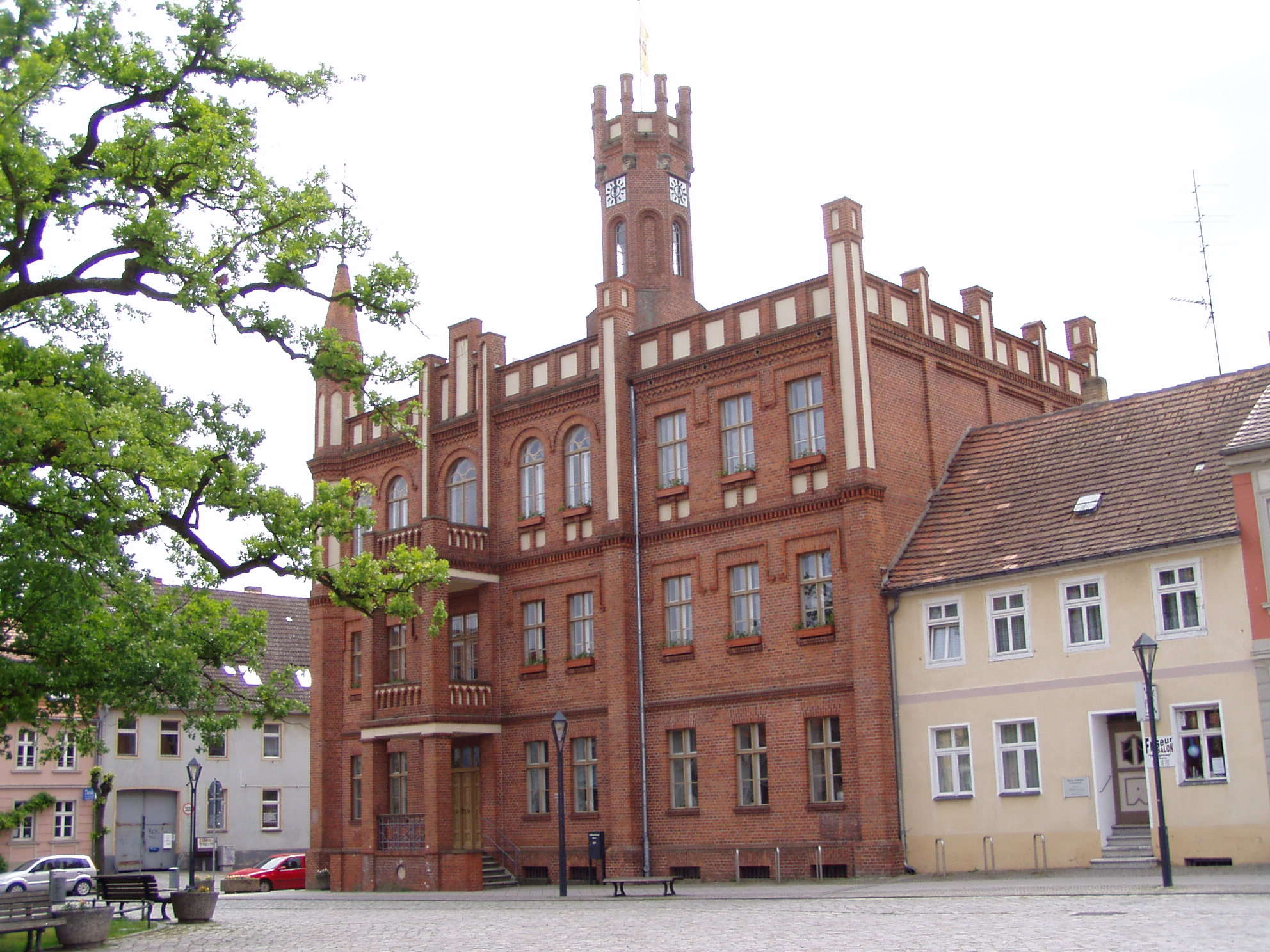 The city hall in Kyritz (Germany) Das Rathaus in Kyritz (Deudschland)